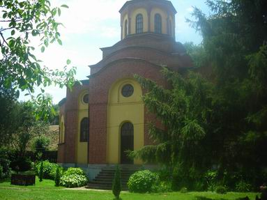 Description une église (facultatif si vous spécifiez une licence dans la liste déroulante)Other versions (facultatif s'il n'y a pas d'autres versions de l'image) une église